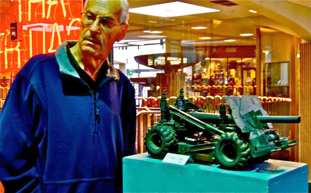 Der US-amerikanische Künstler Stefan Krikl; bei seiner Einzelausstellung Expressionist Cartoons (Drucke, Gemälde und Miniaturinstallationen) im Dezember 2009 in der Central Library and Art Gallery in Huntington Beach, Kalifornien (hier mit einem seiner Miniatur-Panzermodelle, die er bei seinen Miniaturinstallationen verwendet, u. a. bei seinem Projekt Postcards from the Front).